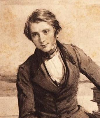 Il giovane Jonh Ruskin